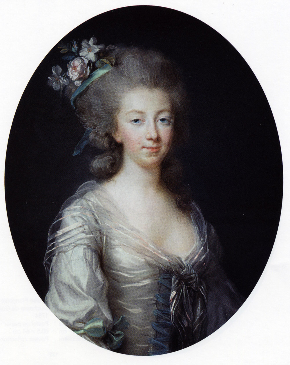 Louise-Augustine de Montesquiou-Fézensac (1761-1823), épouse d'Anne-François de Lastic, marquis de Sieujac. Dame d'honneur de Madame Élisabeth